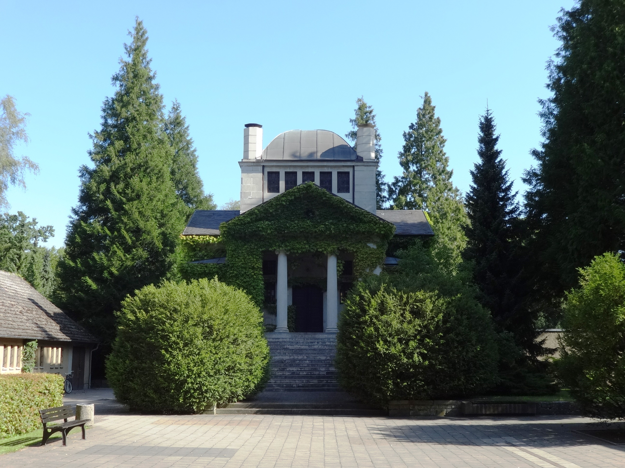 Neuer Friedhof im Nordwesten von Greifswald mit Trauerhalle, Krematorium und Sowjetischem Ehrengrab in Mecklenburg-Vorpommern